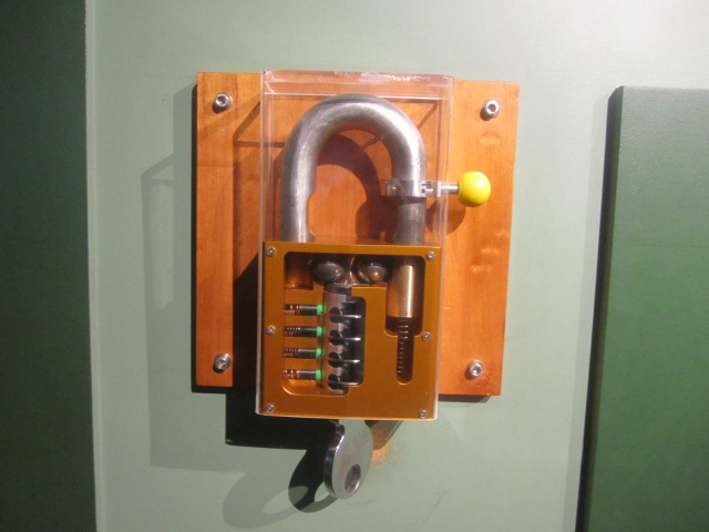 कुलुपाचा आतील भाग